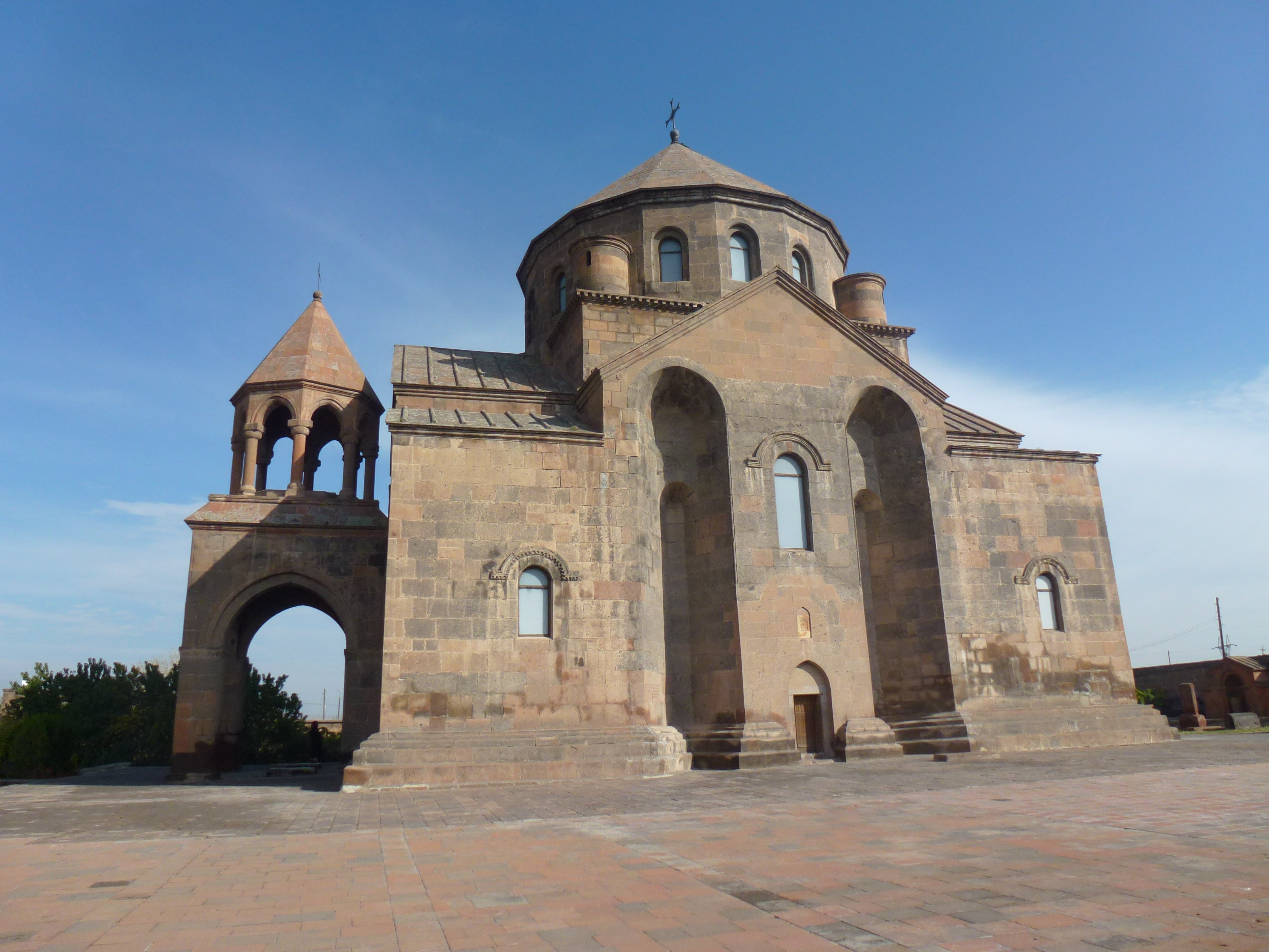 Սուրբ Հռիփսիմե տաճար, Վաղարշապատ 2/17